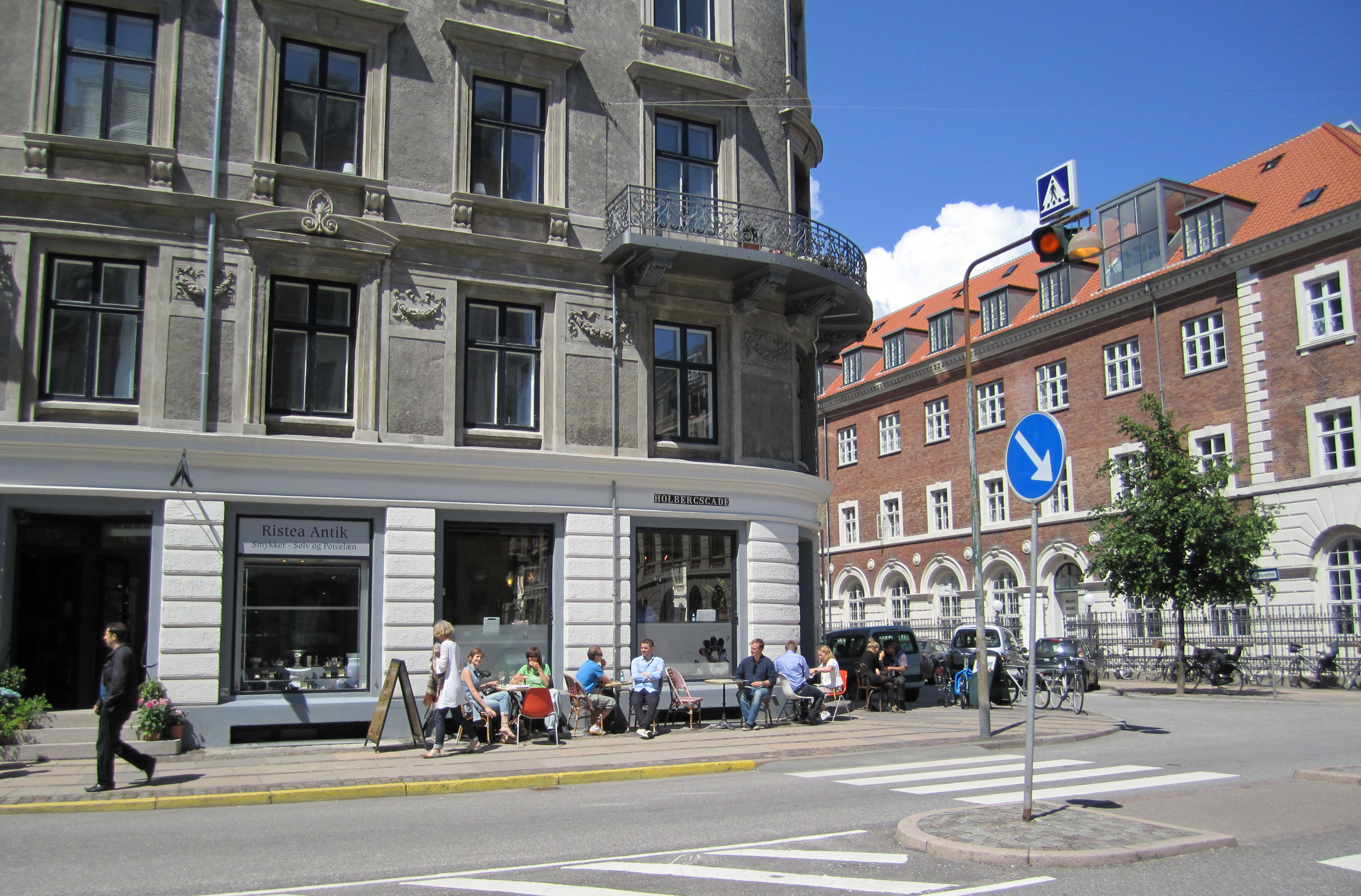 Cafe, Holbergsgade, Copenhagen, Denmark